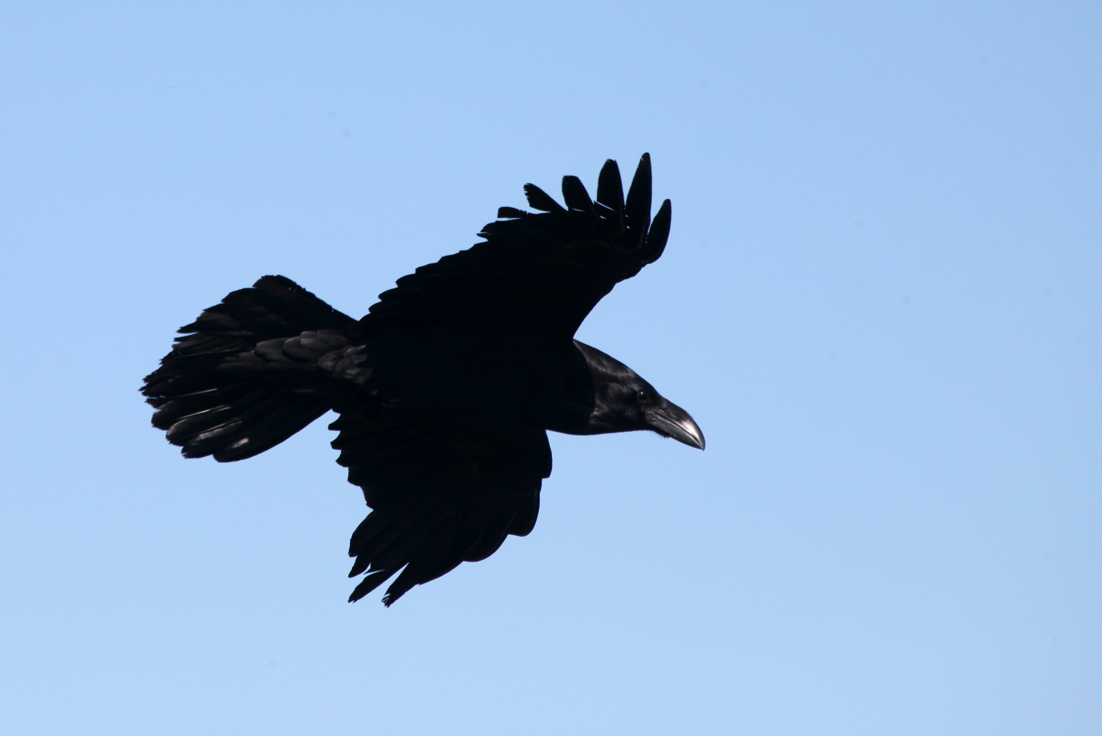 Grand corbeau à la Dent de Vaulion.